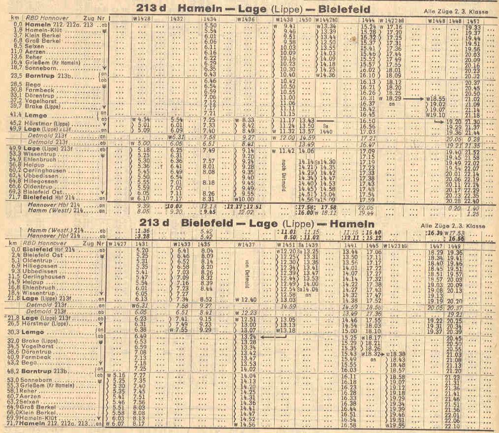 Fahrplan der Bahnstrecke Hameln-Lage-Bielefeld von 1944, Auszug aus dem Reichsbahn-Kursbuch von 1944